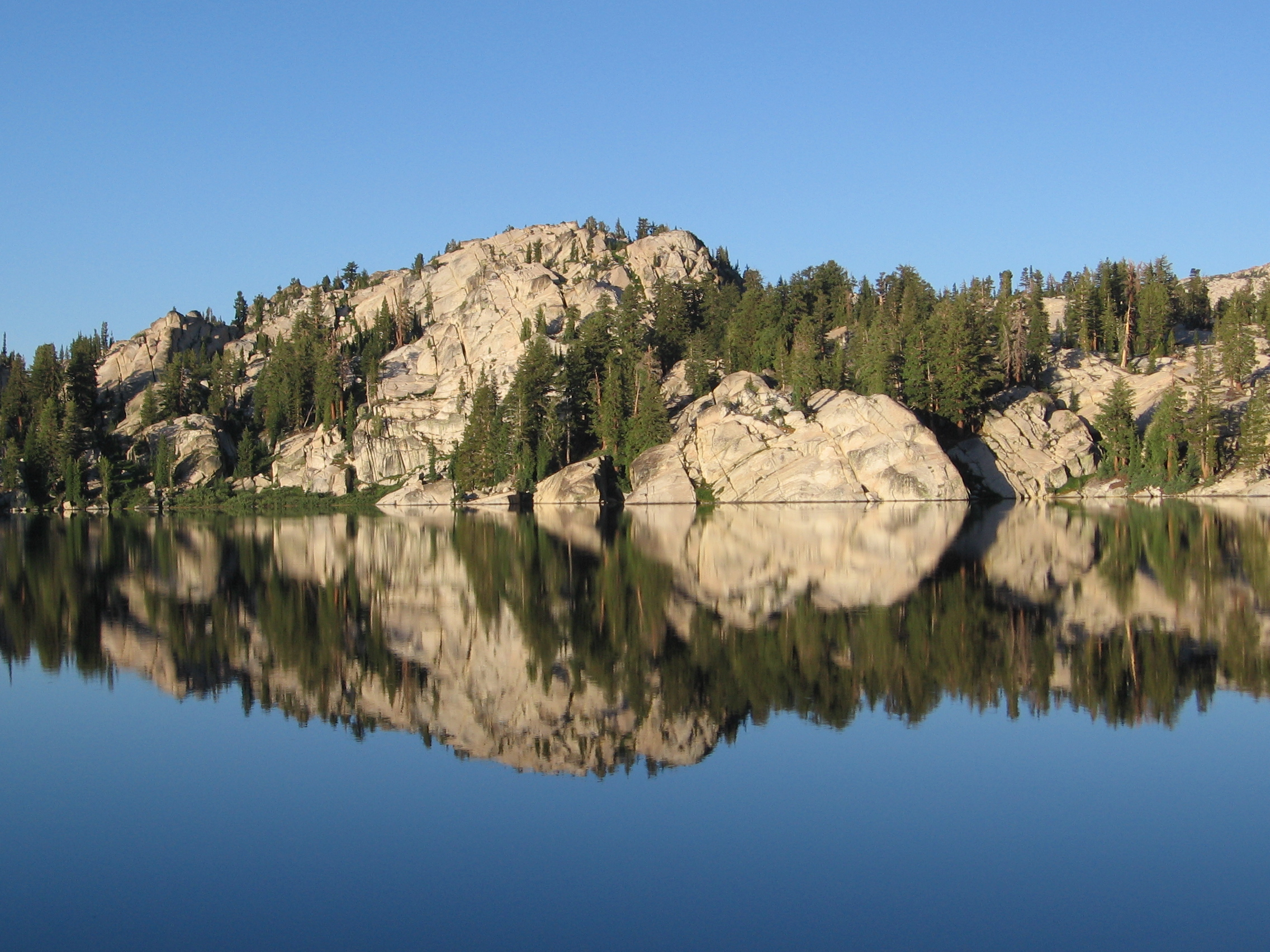 Peeler Lake